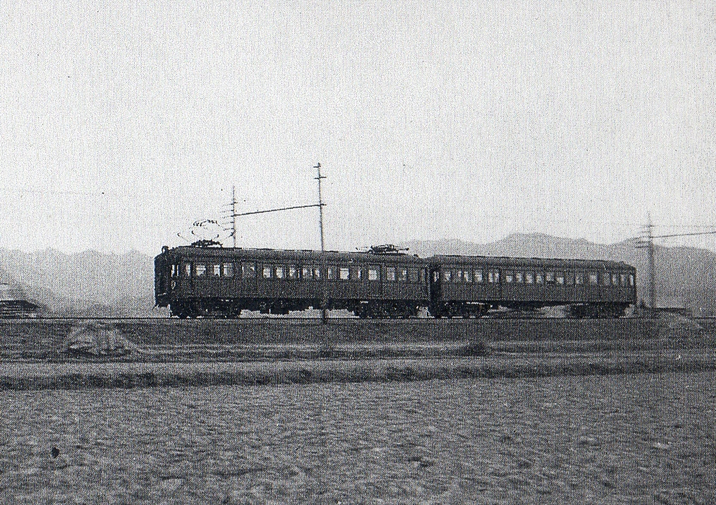 阪和砂川付近の急行